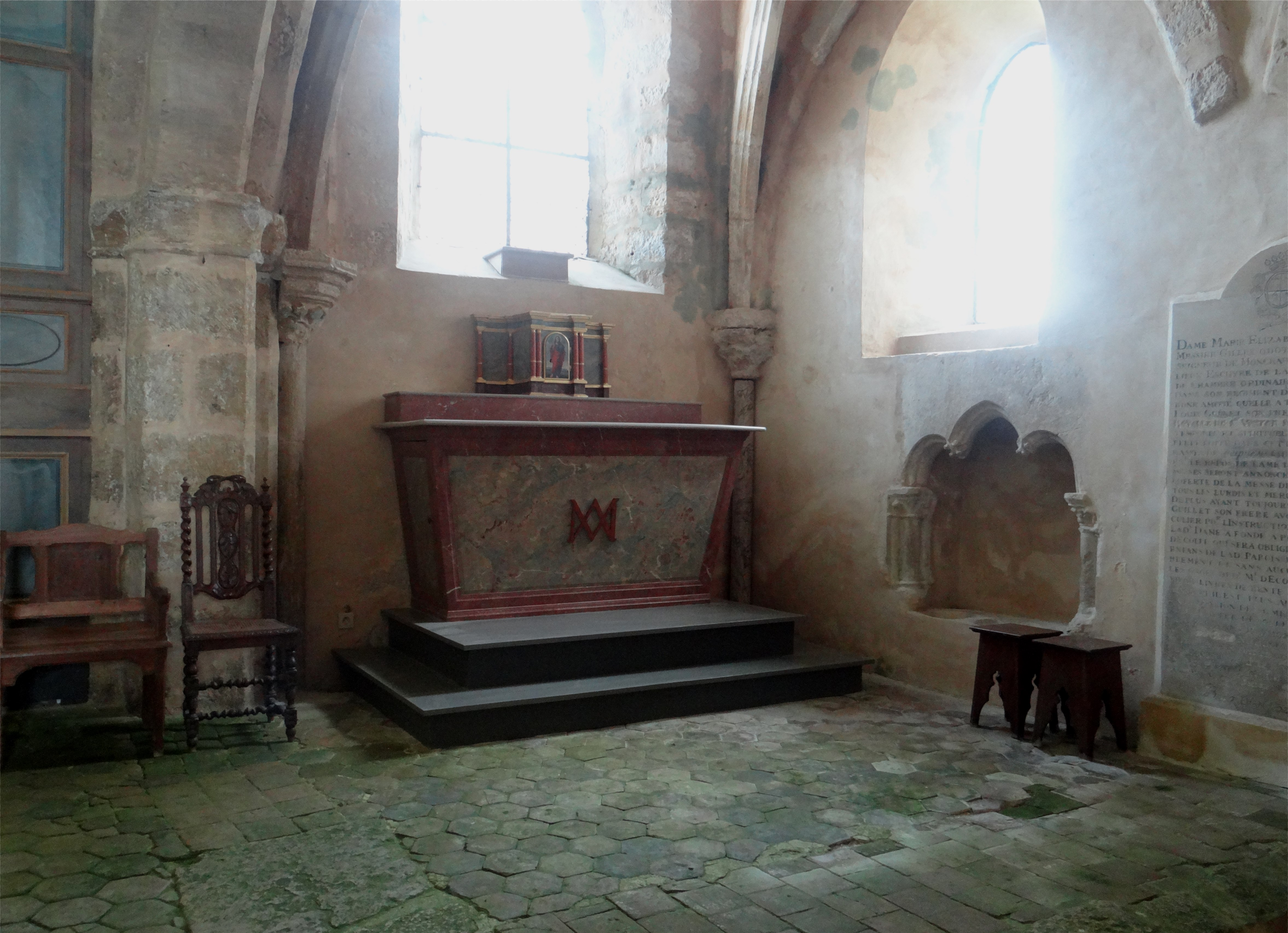 Piscine liturgique à arc trilobé (à droite de l'autel), Église Notre-Dame-de-l'Assomption, Amponville, Seine- et-Marne, France.